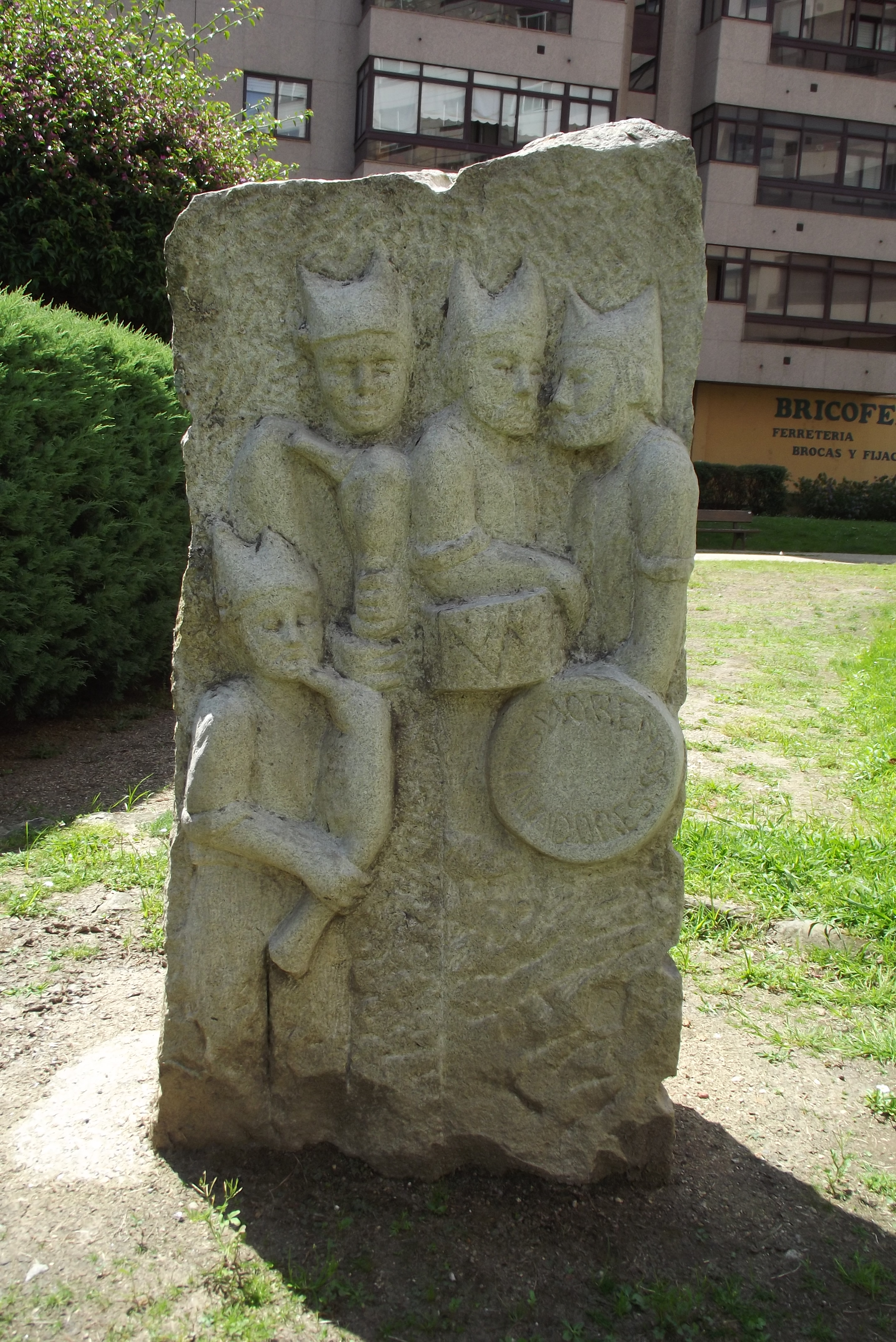 Monolito na honra d'Os Morenos de Lavadores, na praza que leva o nome déstes no rueiro d'O Sobreiro, en Vigo.